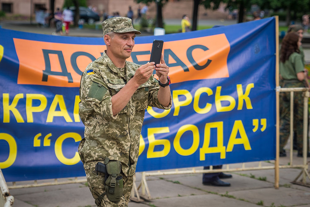 Руслан Кошулинський фотографує натовп на площі у Краматорську 05.07.15 р.